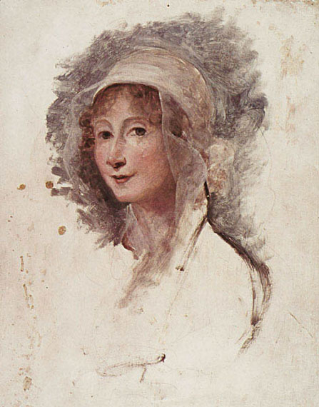 "Ritratto di Giulia Manzoni Beccaria", eseguito a Parigi e conservato alla Biblioteca Nazionale Braidense di Milano